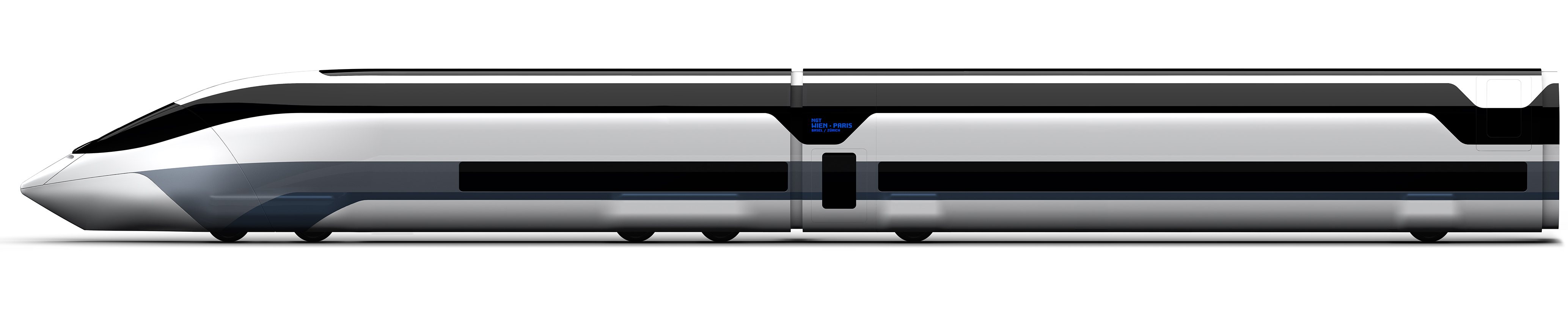 Seitenansicht des Next Generation Train (NGT).